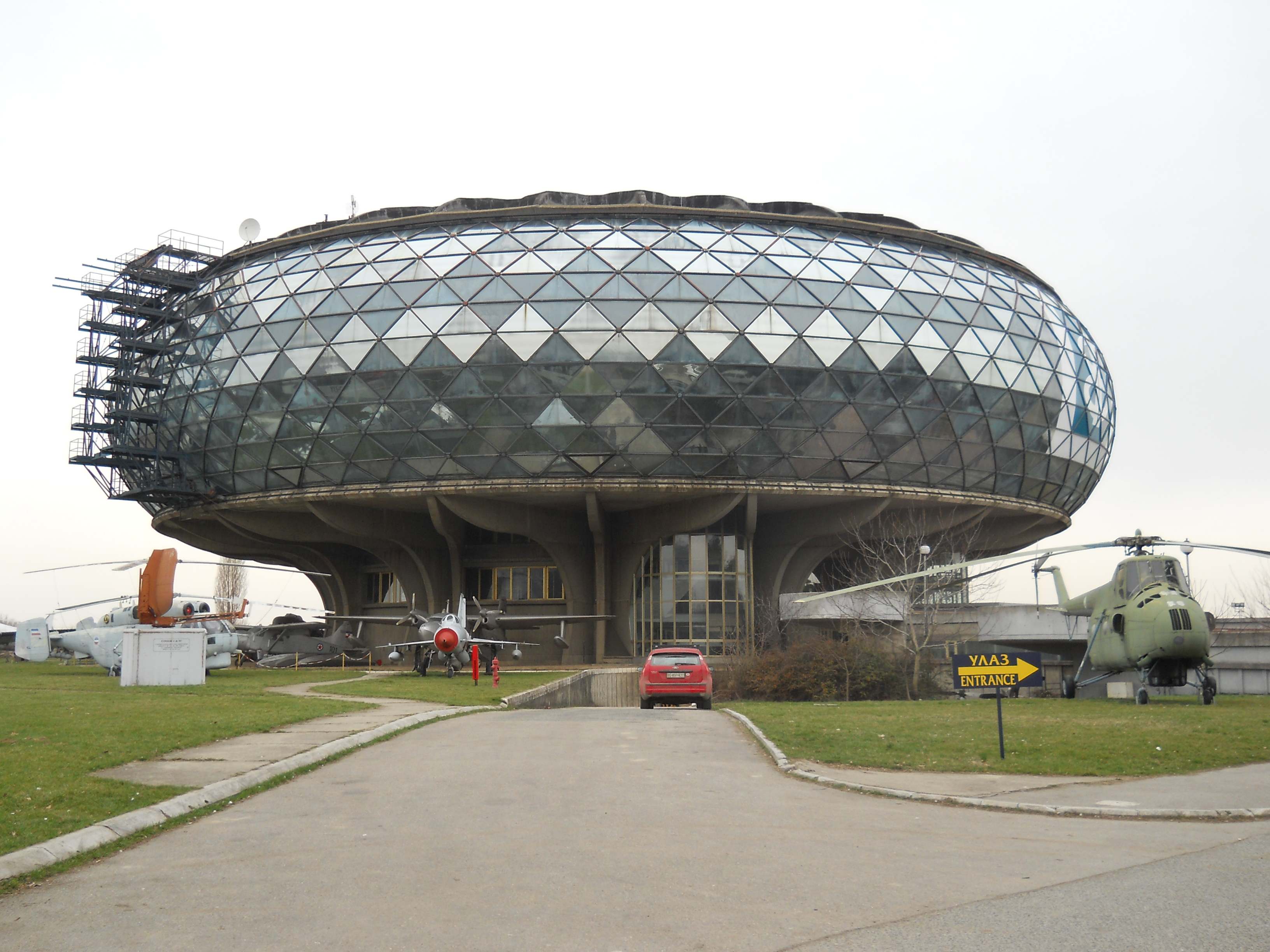 belgrade serbia nikola tesla aviation museum